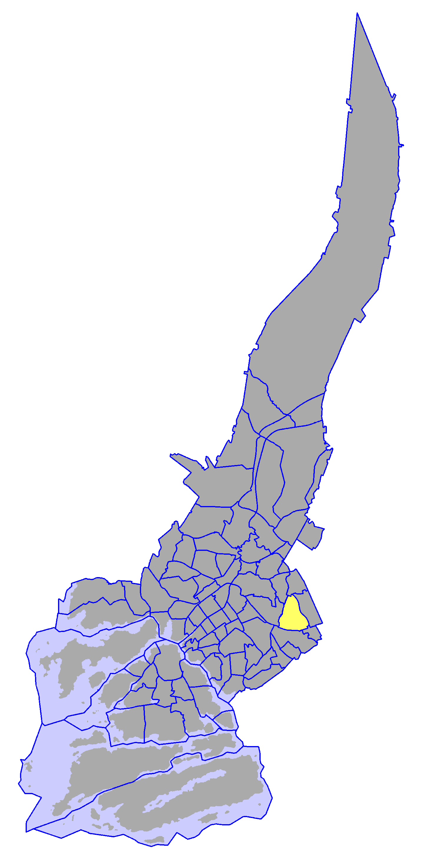 District of Pääskyvuori, in Turku